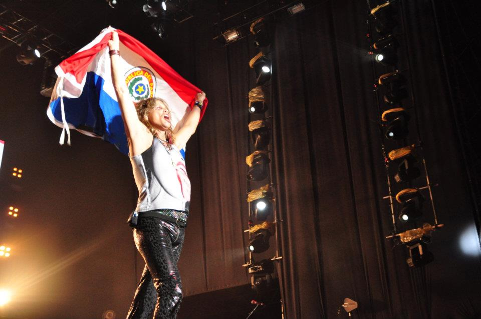 Concierto en el Jockey Club de Asunción Paraguay ante unas 70.000 personas.